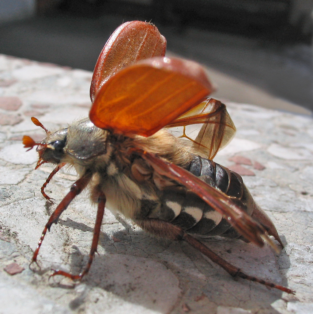 Beschreibung: Feldmaikäfer (Melolontha melolontha) / Weibchen / kurz vorm Wegfliegen Fotograf: Darkone, 8. Mai 2005